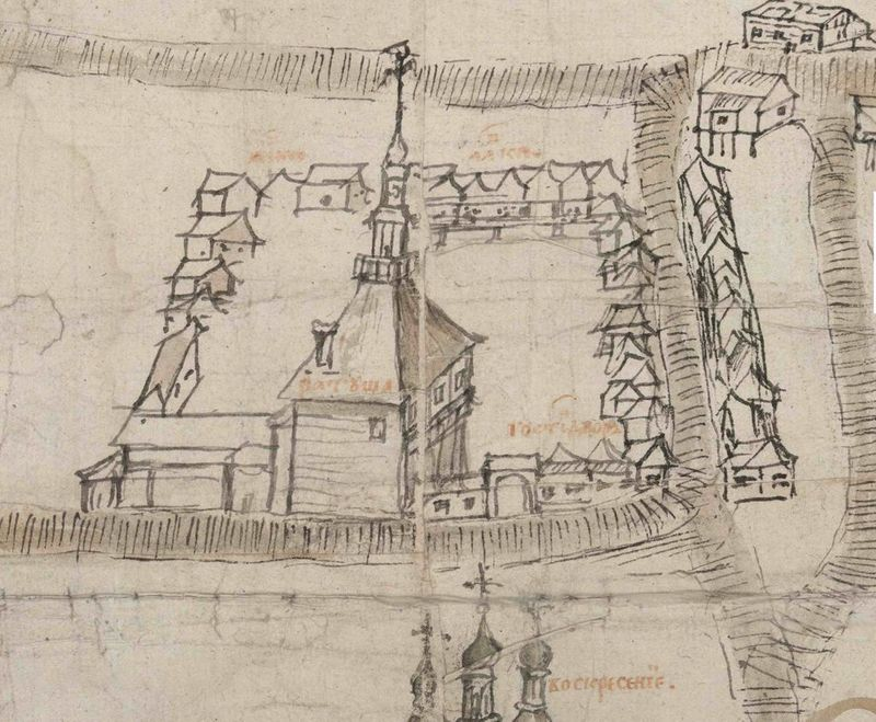 Беларуская (тарашкевіца): Віцебск (Viciebsk). Ратуша